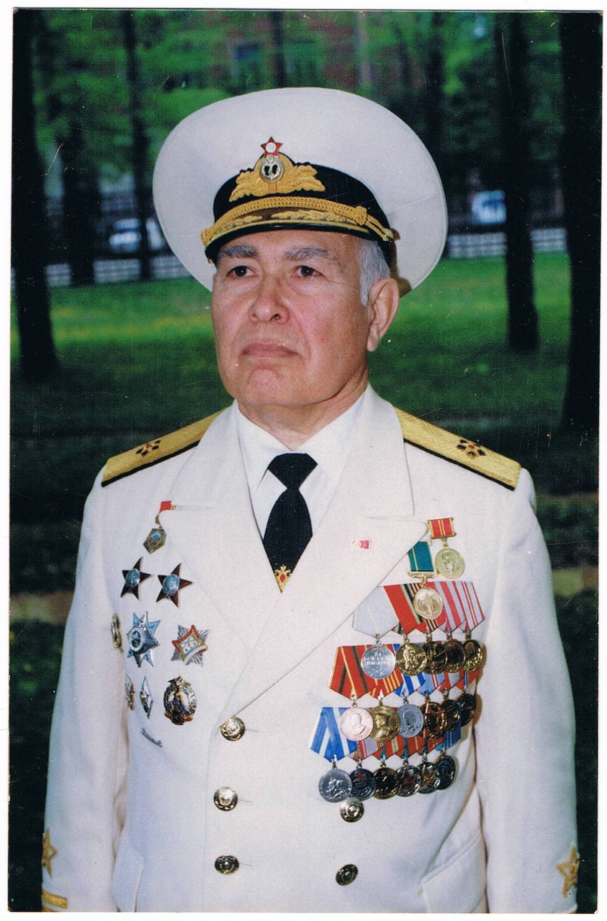 Контр-адмирал Тхагапсов М.М. в День Победы . Майкоп 9 мая 2004 года.